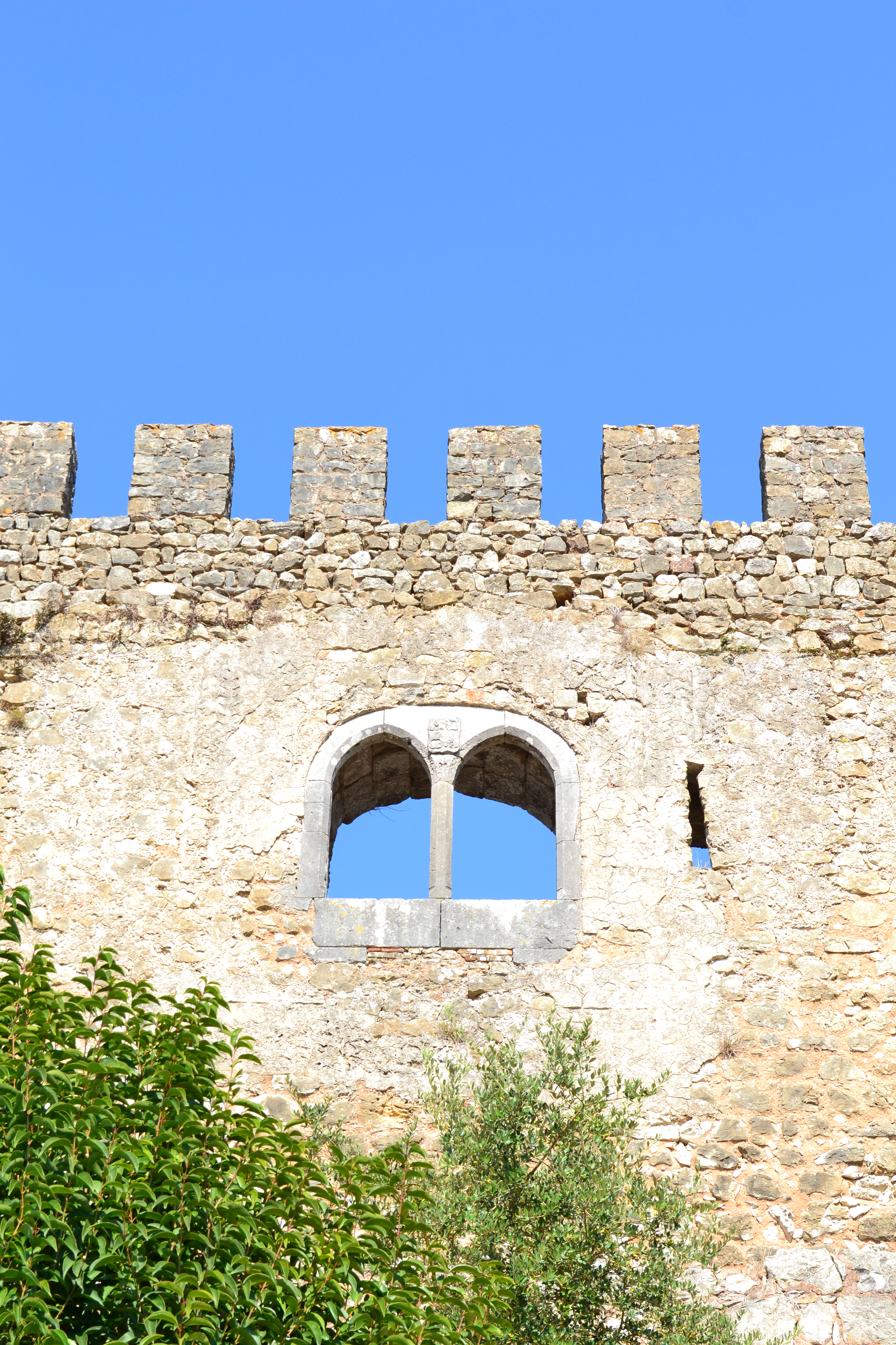 Castelo de Pombal This file was uploaded for Wiki Loves Monuments in Portugal with the unique identifier 71165.